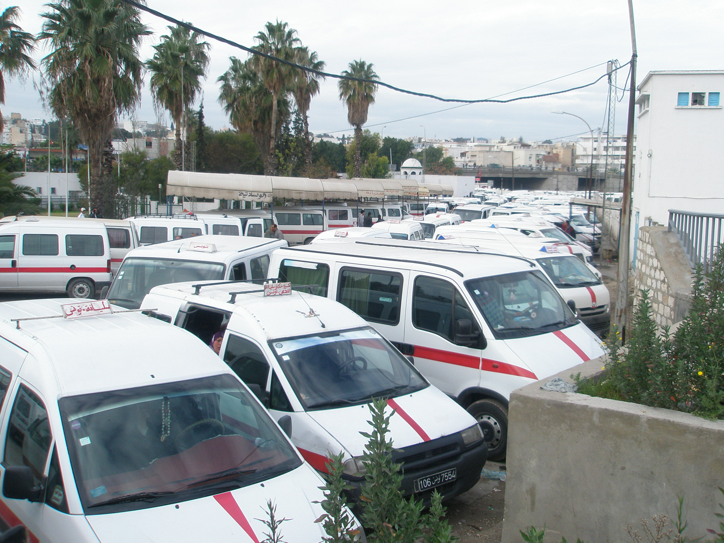 Stations de louages à Tunis (Tunisie)